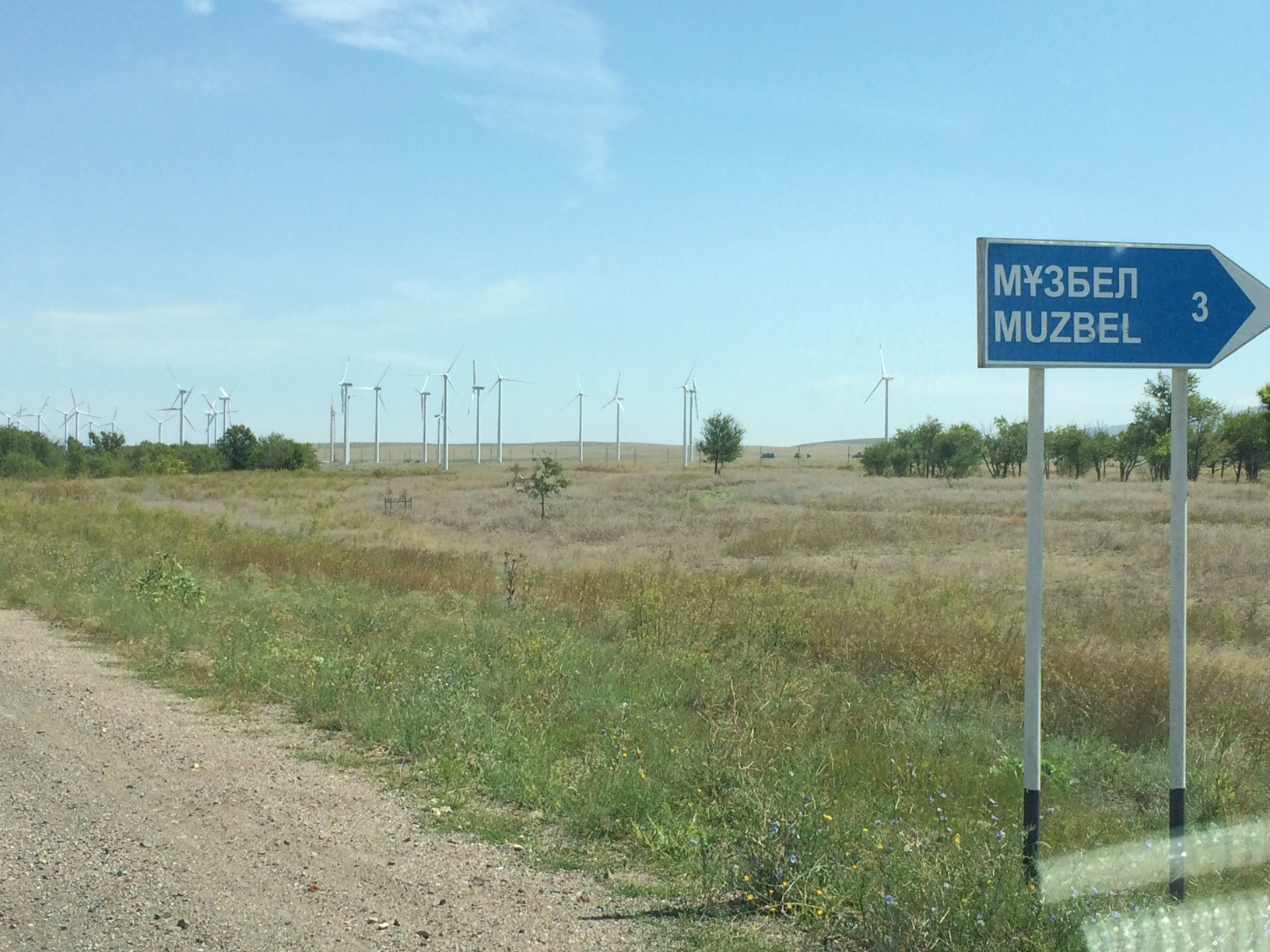 Музбель, Кордайский перевал, Казахстан